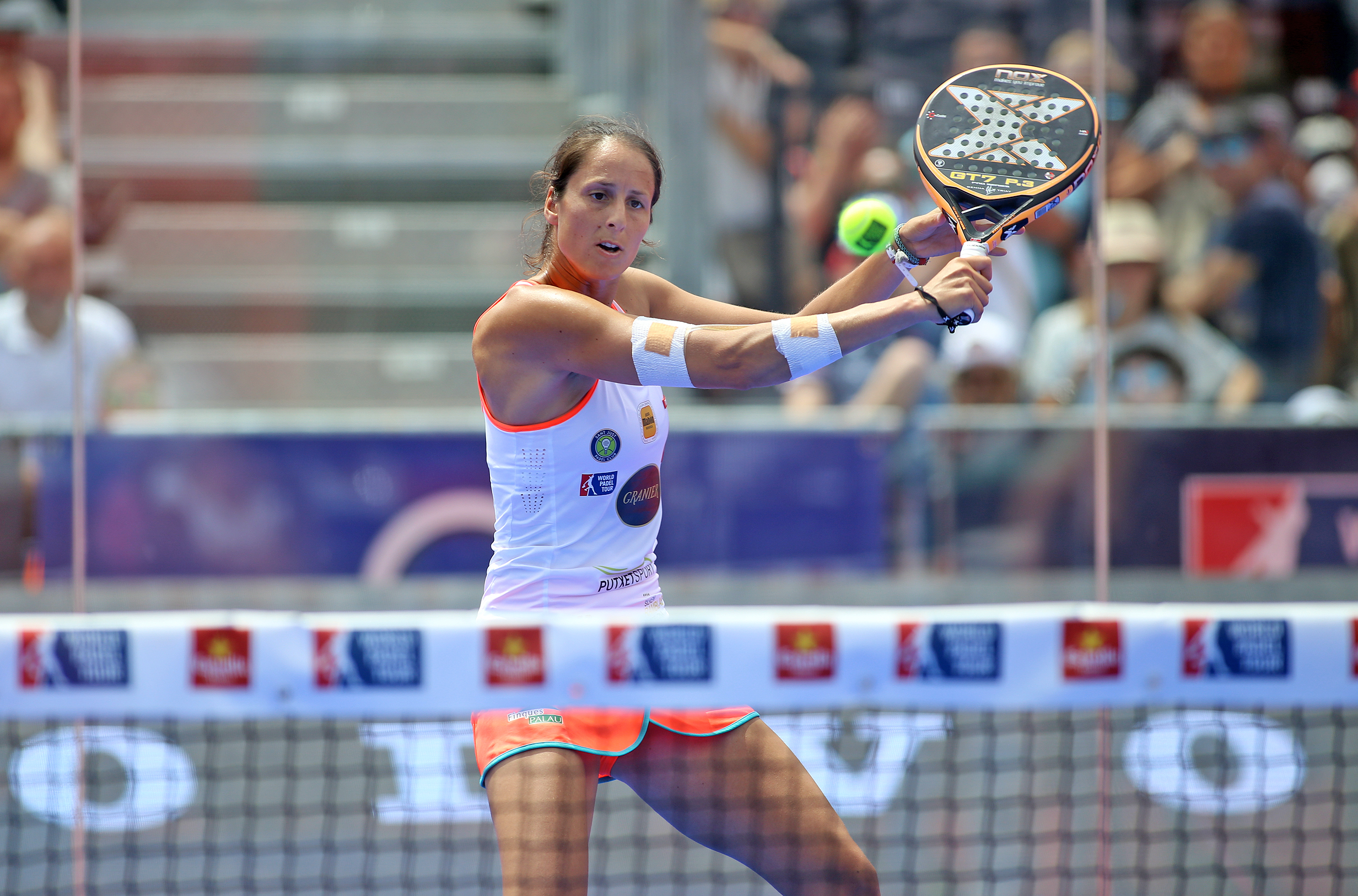 Gemma Traiy en el WPT Barcelona 2017